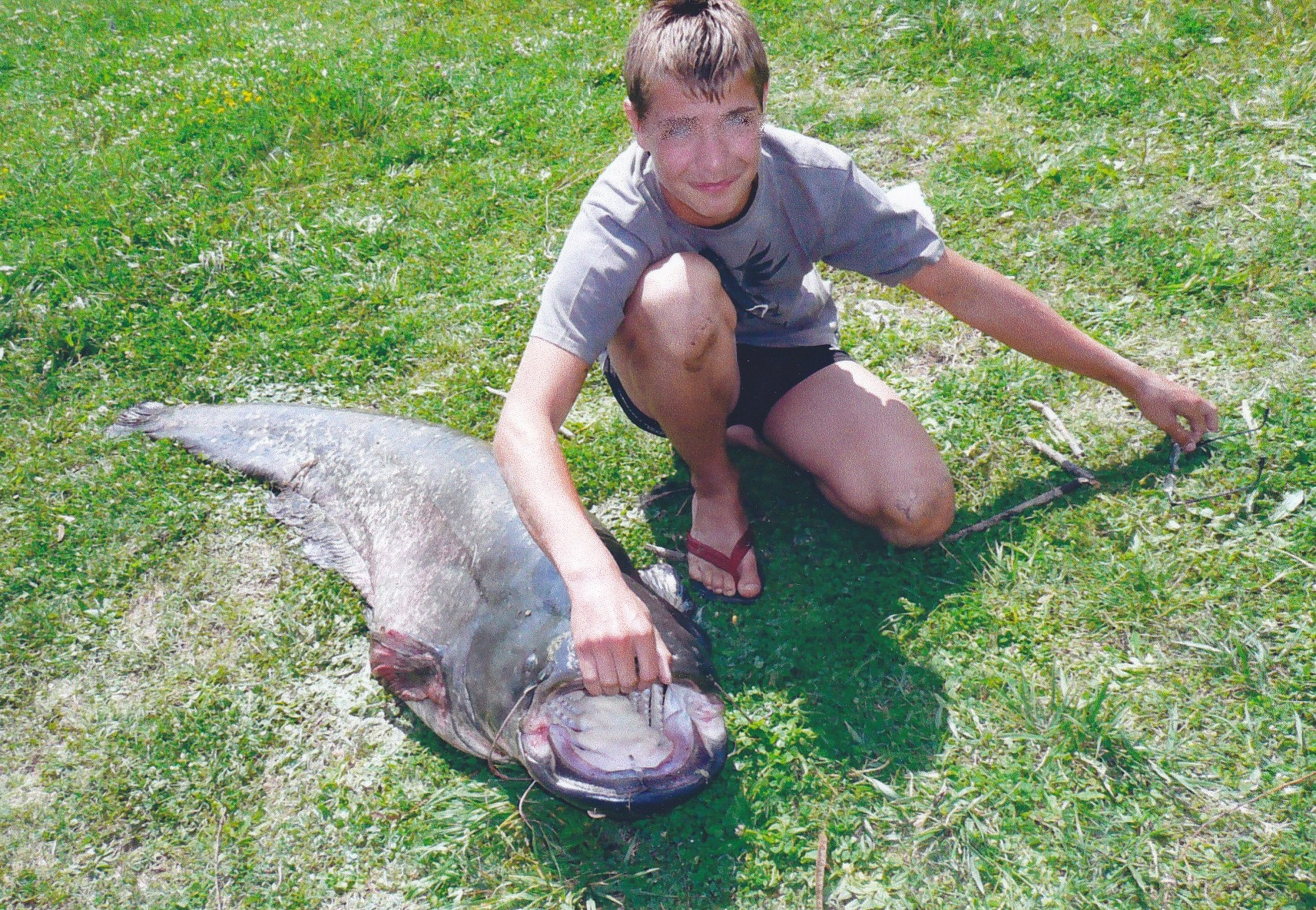 Silure de près de 60 kg et 205 cm dans une gravière en communication avec la Saône, capturé par un adolescent de 15 ans le 30 juillet 2011 à Seurre (Côte d'Or, France)